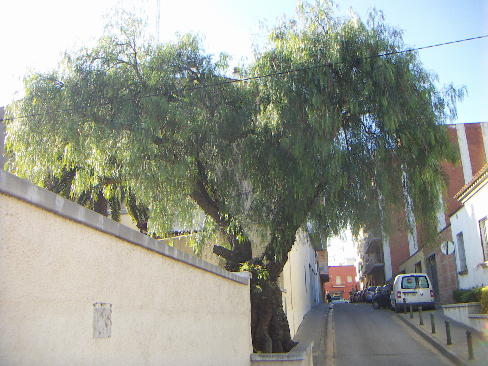 Arbre de pebre centenari en un carrer de Figueres